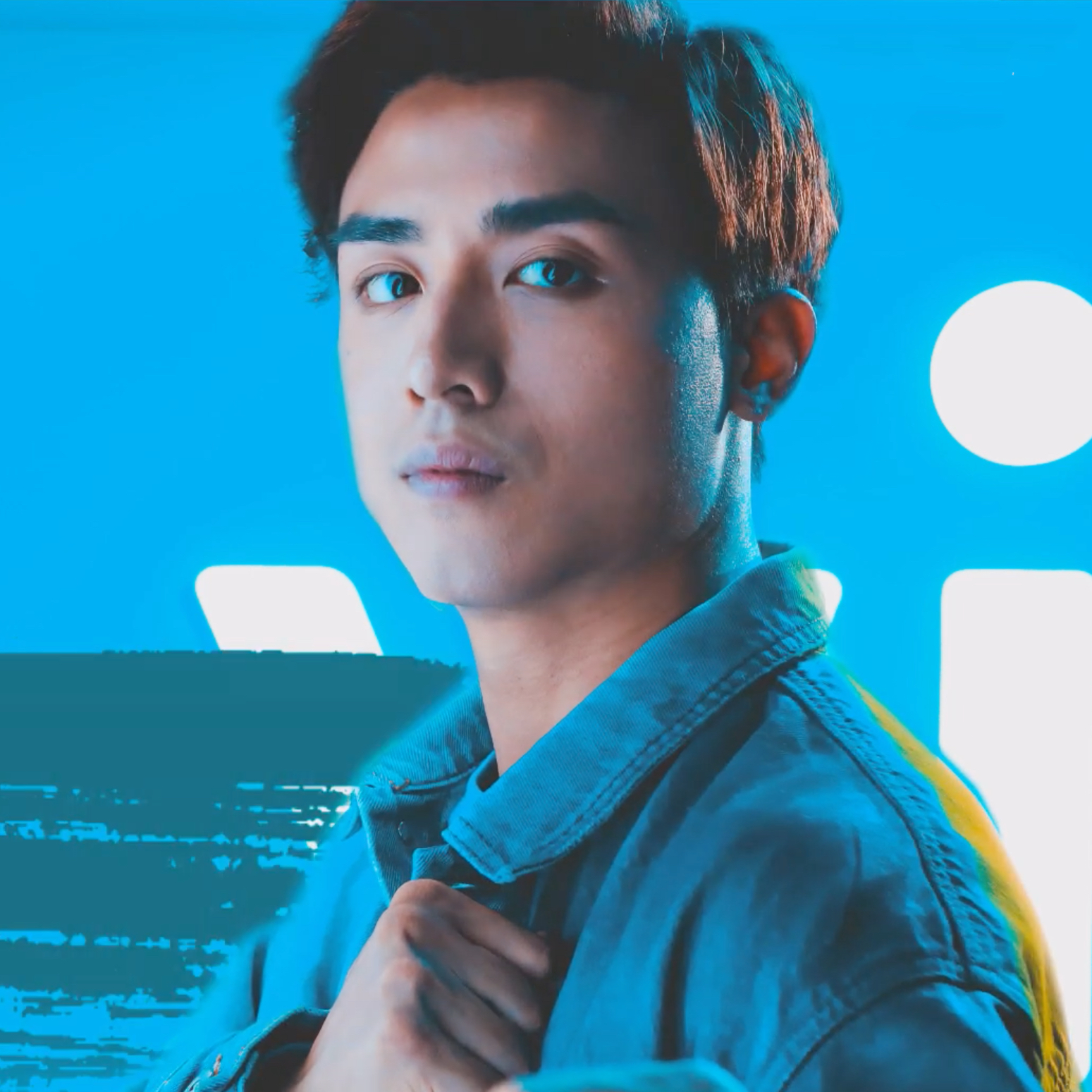 中文（香港）: 香港男子音樂組合MIRROR副隊長